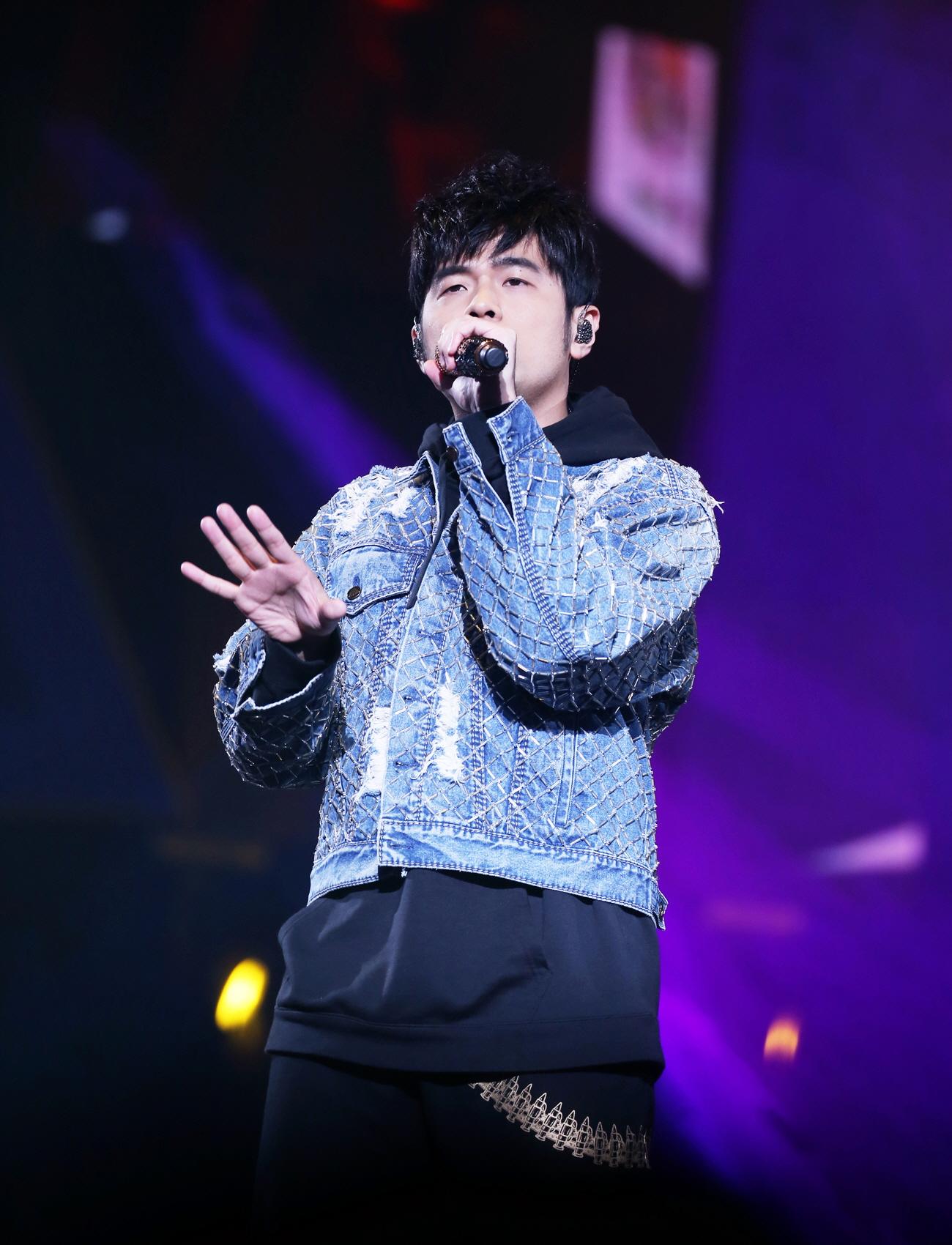 咪咕音乐盛典